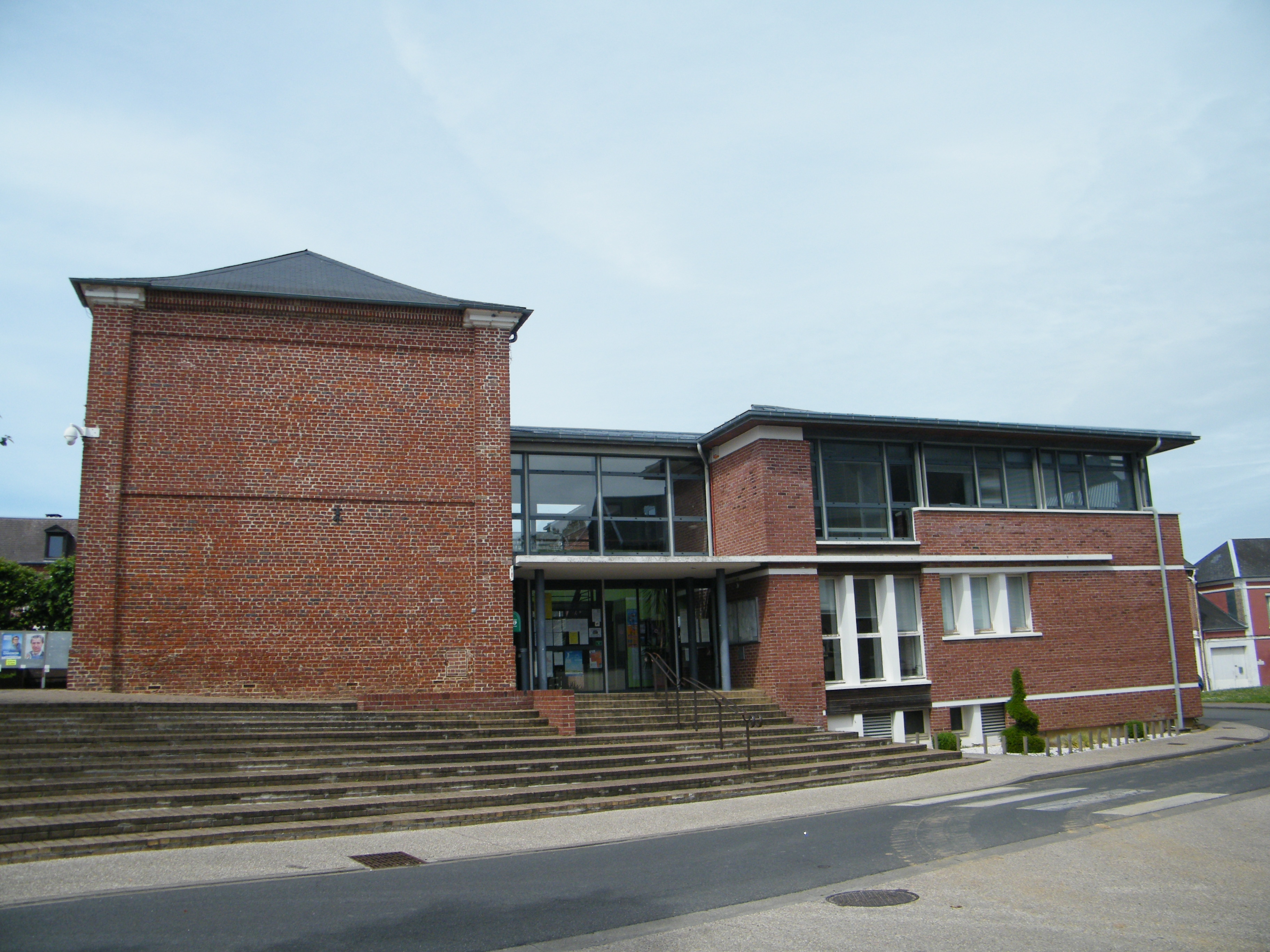 Friville-Escarbotin Somme Fr, mairie, bâtiments récents.